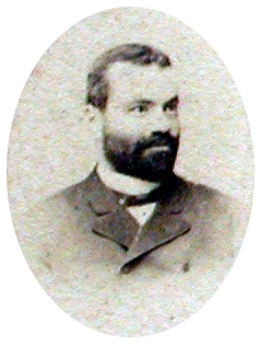 Porträt von Wilhelm Fischel (1851-1910)